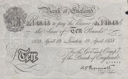 A Bank of England klasszikus 1938. április 19-i kibocsájtású "fehér" tízfontosa, mérete 211 X 133 mm.